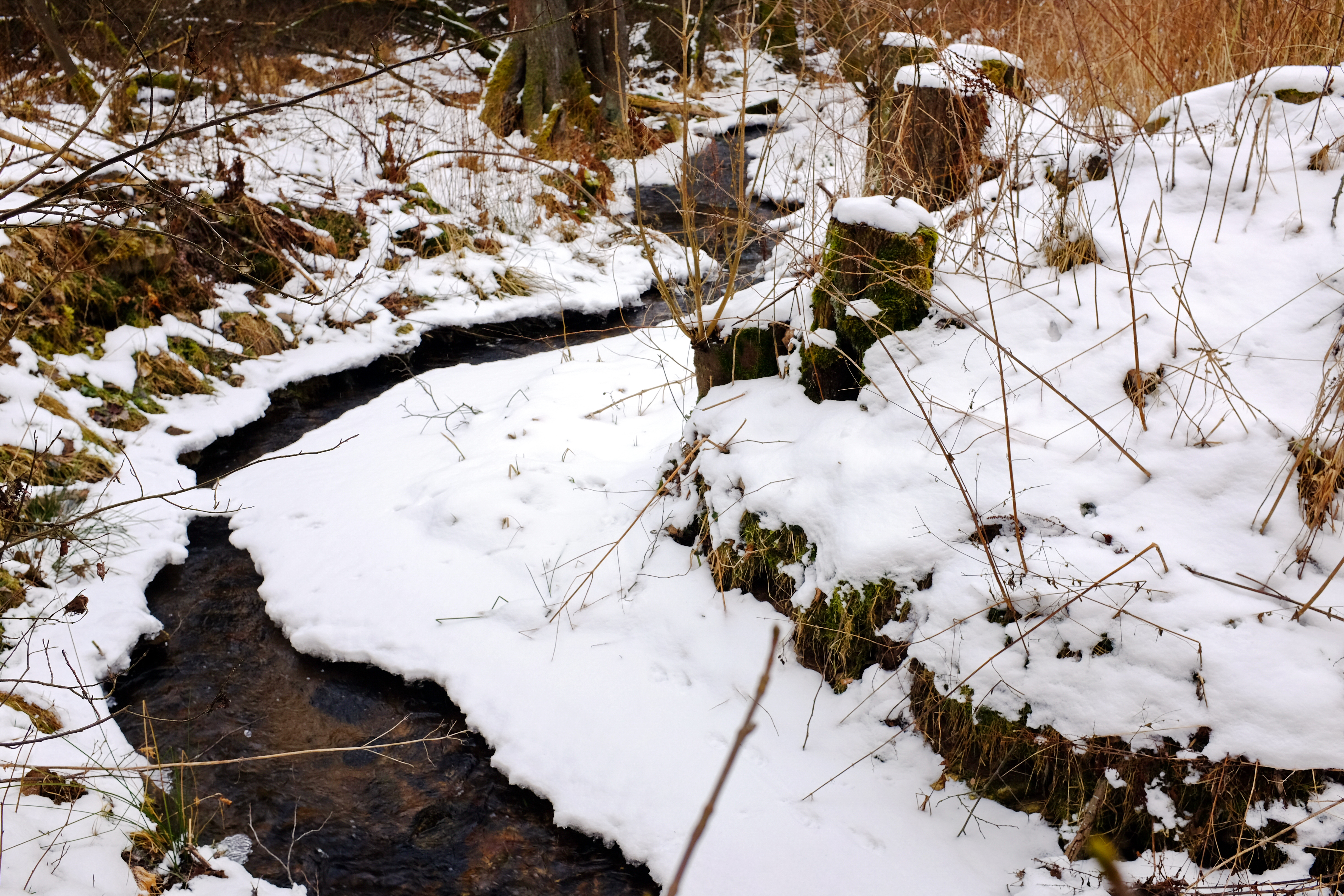 Dubinský potok v místě pod Andělskou horou, okres Karlovy Vary